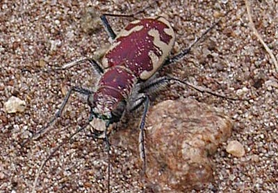 Cicindela formosa formosa Dejean - Sandlaufkäfer aus den USA